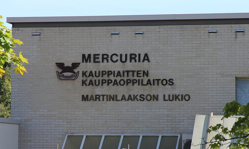 Mercuria kauppaoppilaitoksen ja Martinlaakson lukion nimi oppilaitoksen seinässä Vantaan Martinlaaksossa. Huom: Muista säilyttää viittaus kuvaajaan, mikäli käytät kuvaa.